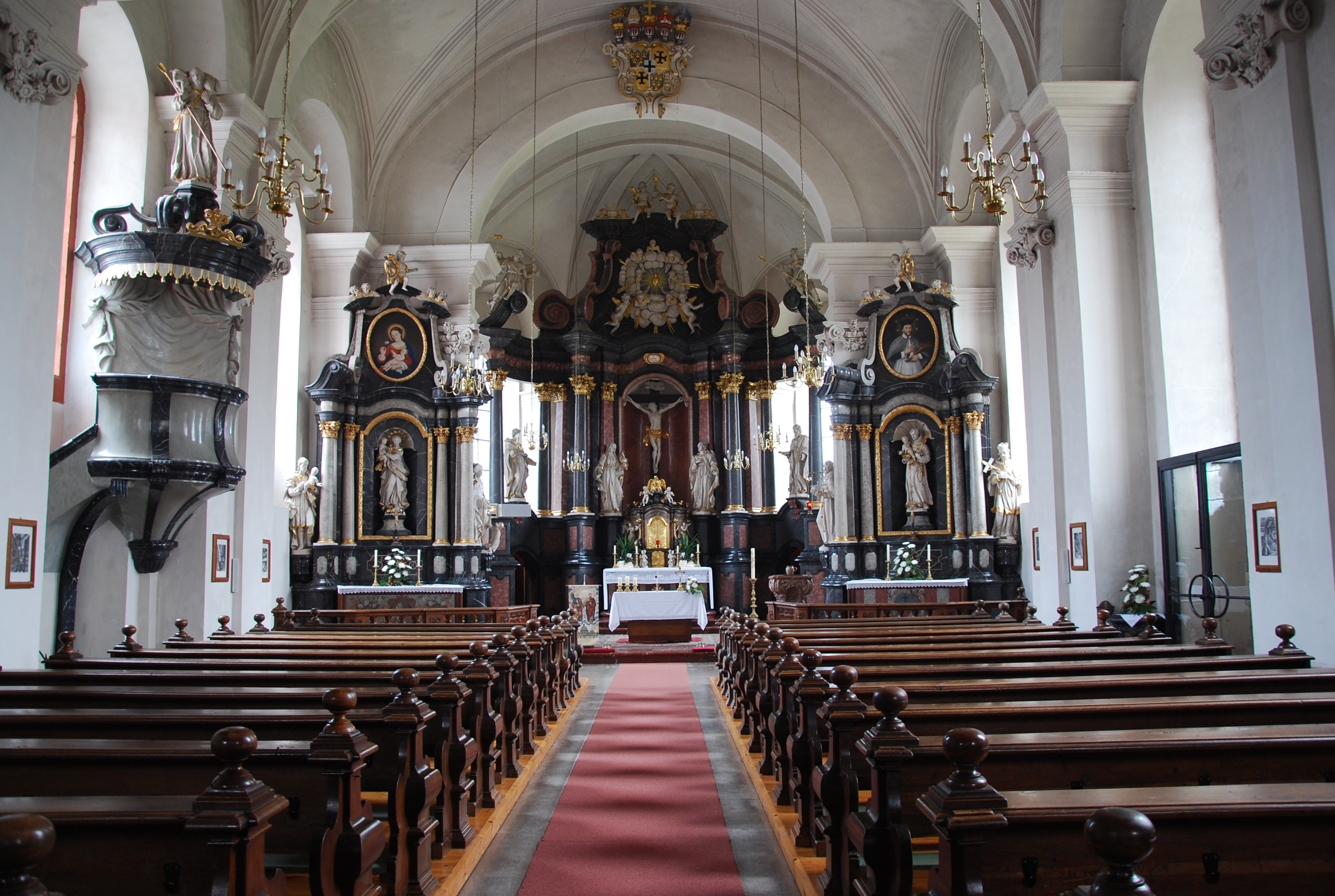 Katholischer Kirche in Dermbach Innenansicht